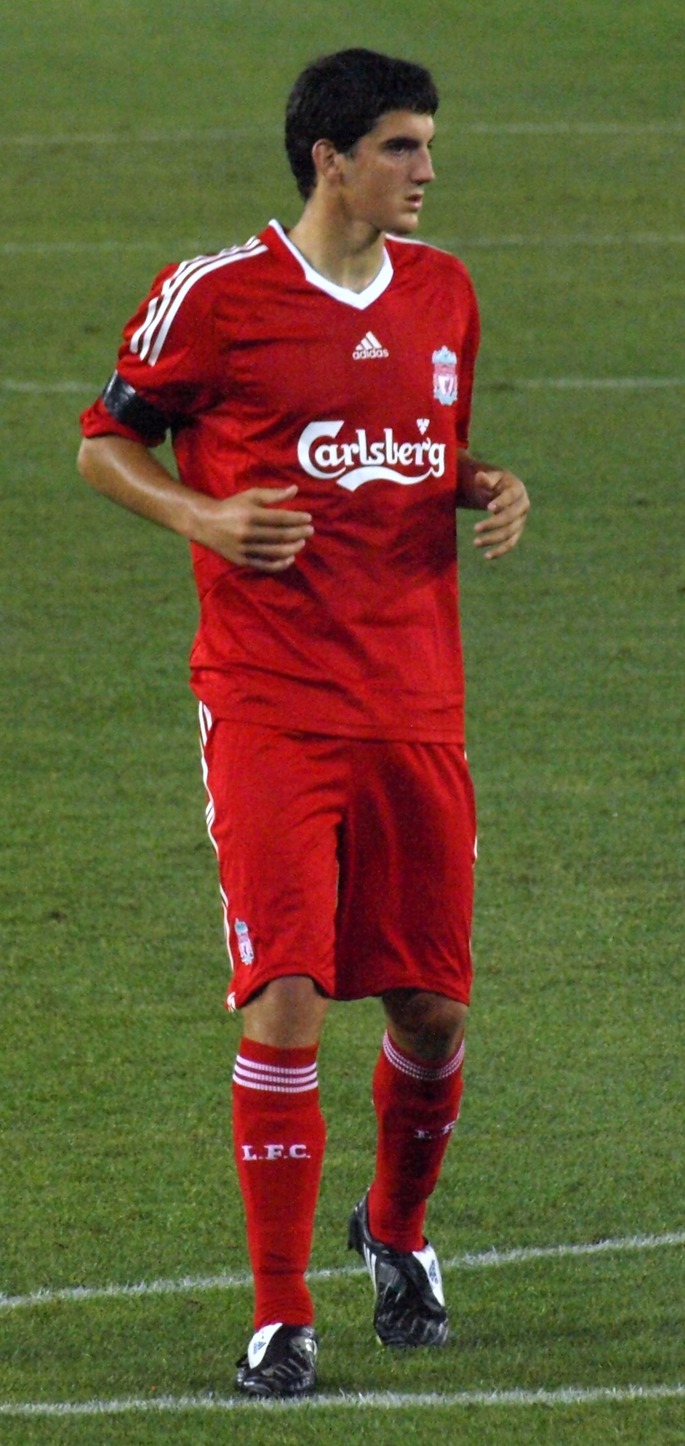 Mikel San José con la camiseta del Liverpool en el partido de presentación del Estadio de Cornella-El Prat disputado ante el RCD Español de Barcelona.